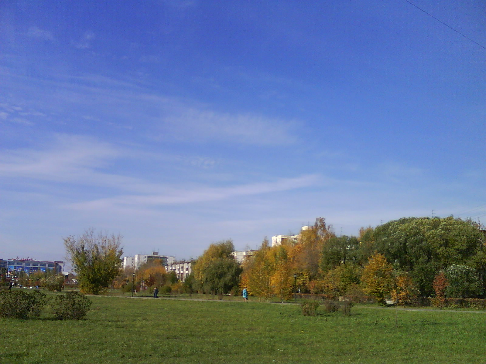 Бульвар Заречный